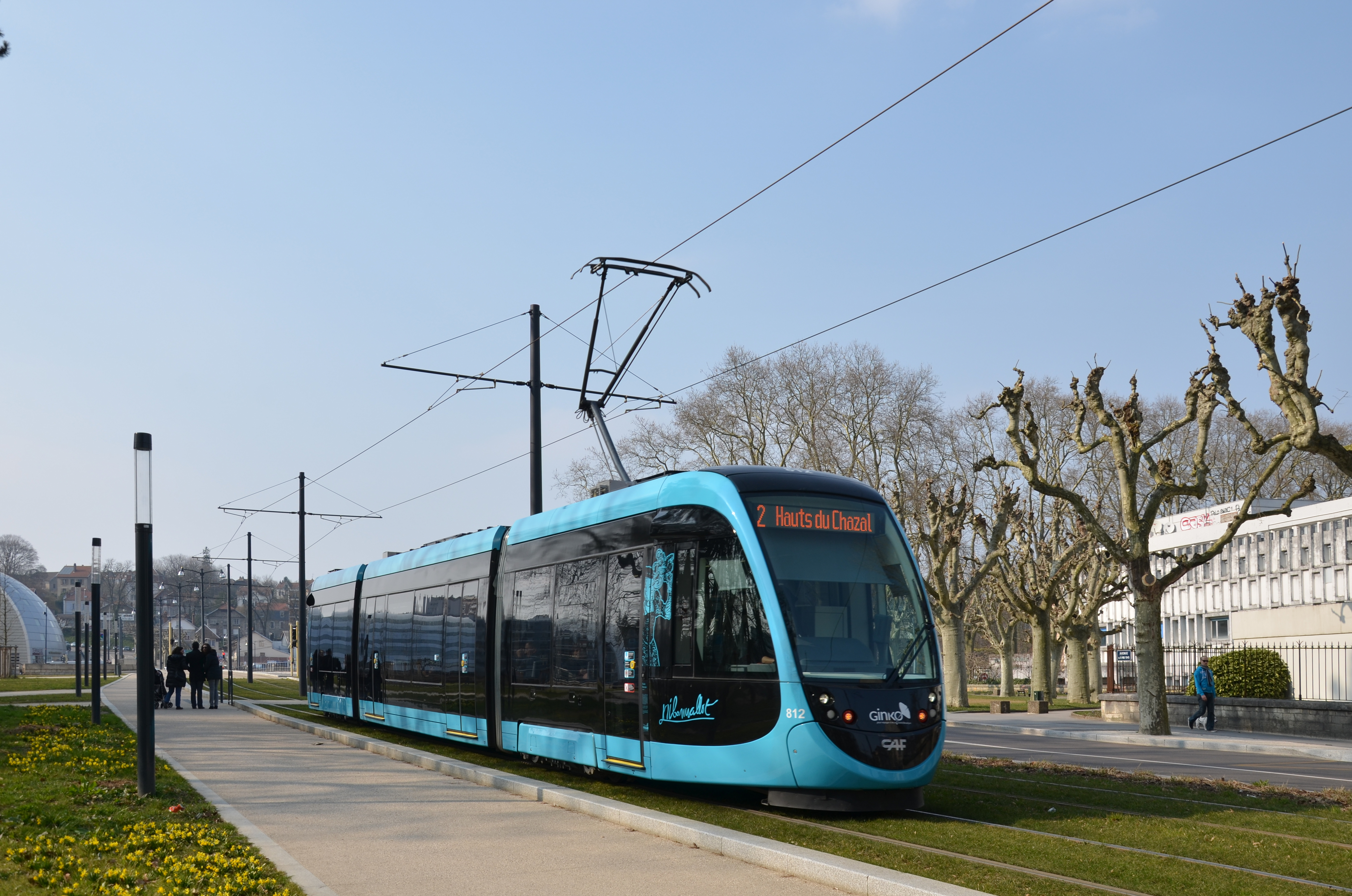 Rame de tramway CAF Urbos 3 n°812 du réseau GINKO près de la station République, à Besançon.